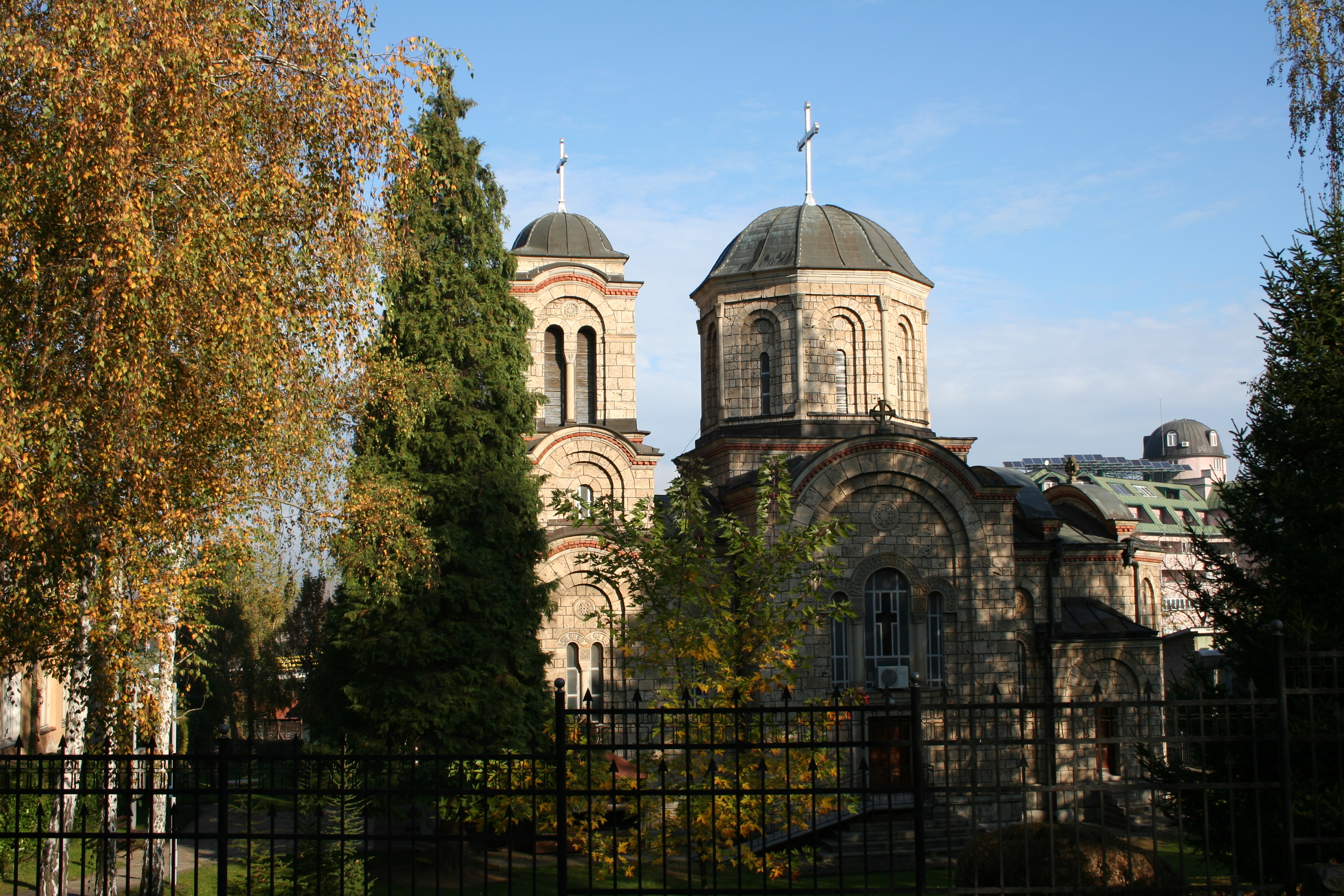 Crkva Sv. Petra i Pavla, Banja Koviljača